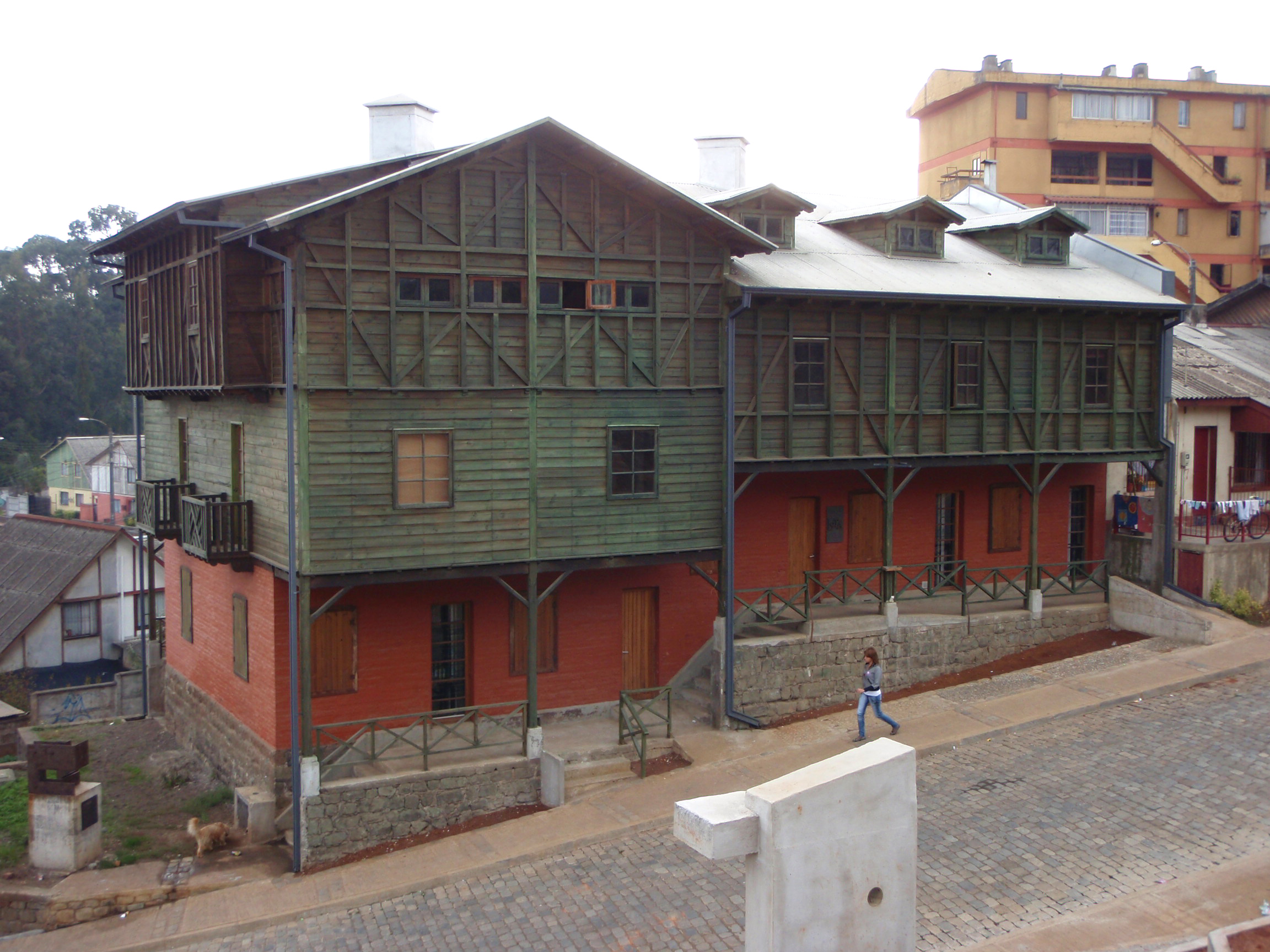 Centro Cultural Pabellón 83, Lota. This is a photo of a national monument in Chile: 2135